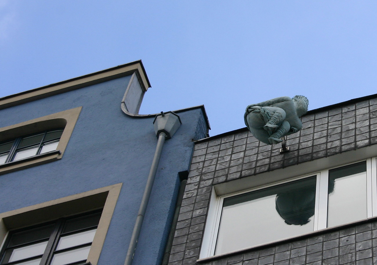 „Kallendresser“ am Haus Nr. 24 auf dem Alter Markt (Köln). Künstler: Ewald Mataré